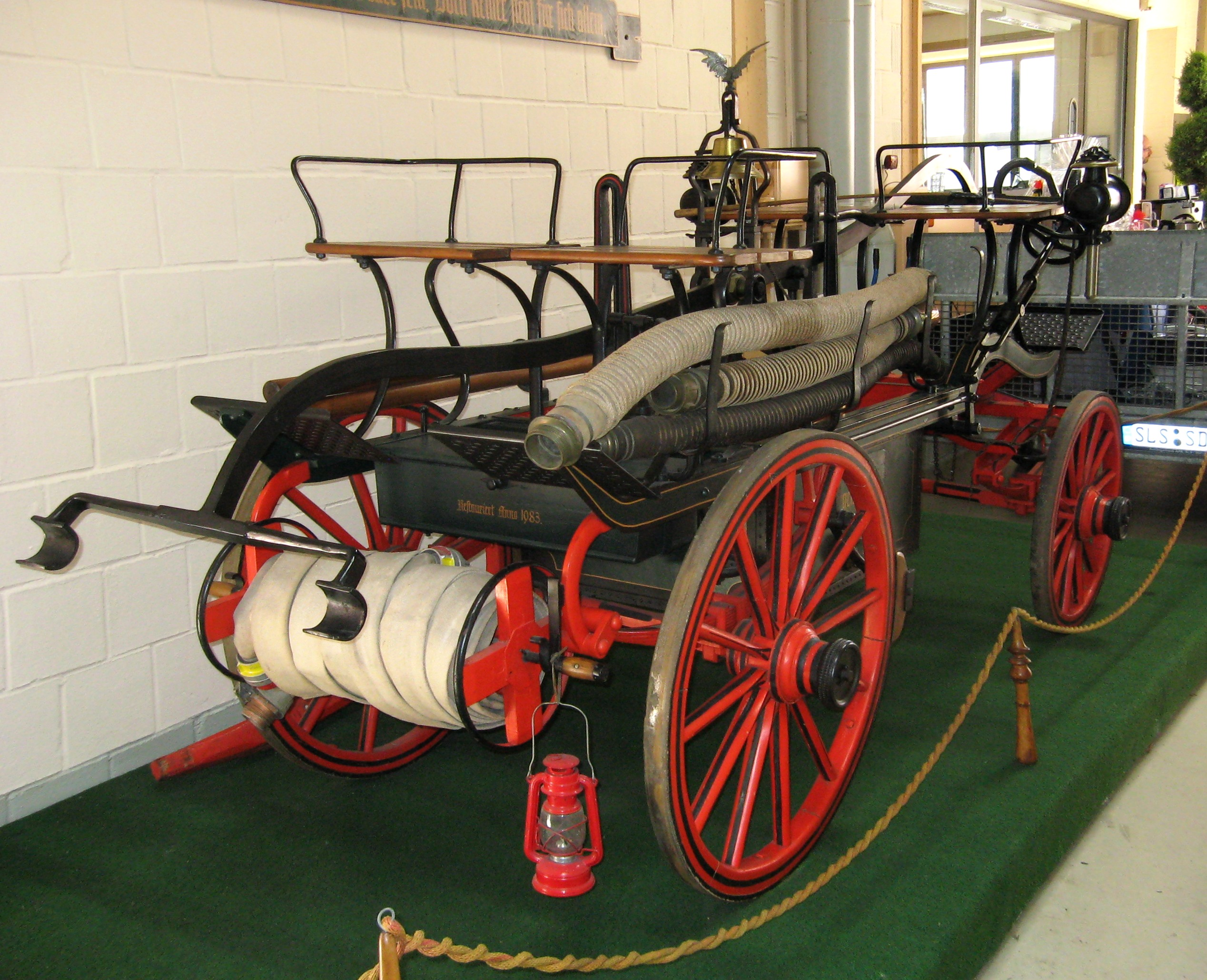 Historische Feuerwehrkutsche in Dillingen. Nürnberger Feuerlöschgeräte & Maschinenfabrik vorm. Justus Christian Braun AG. Fabrik Nr. 7906